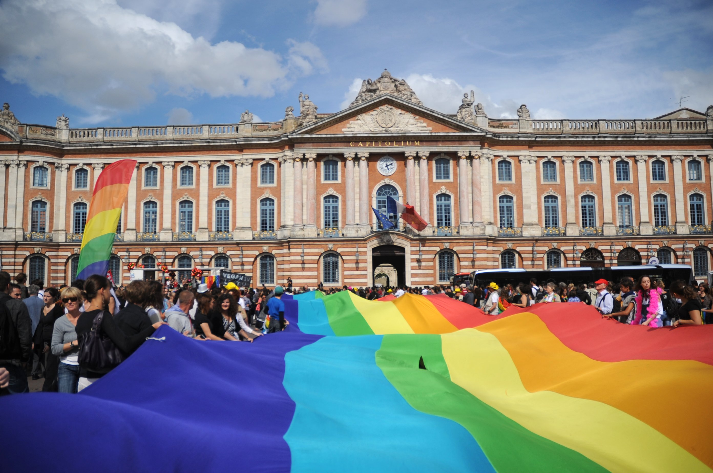 Bandeira estendida em Marcha em frente ao governo de Les Minimes, Toulouse, Pirineu Central, França